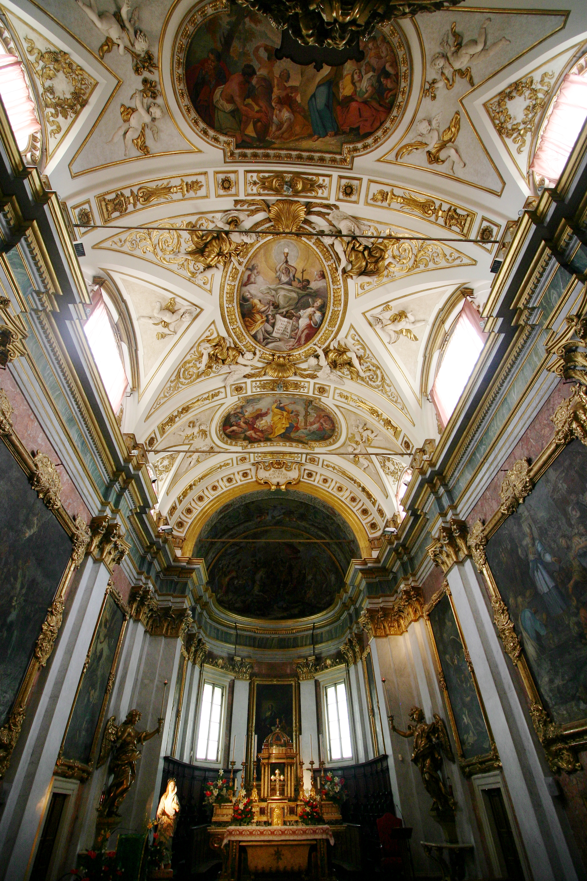 San Rufino - Assisi